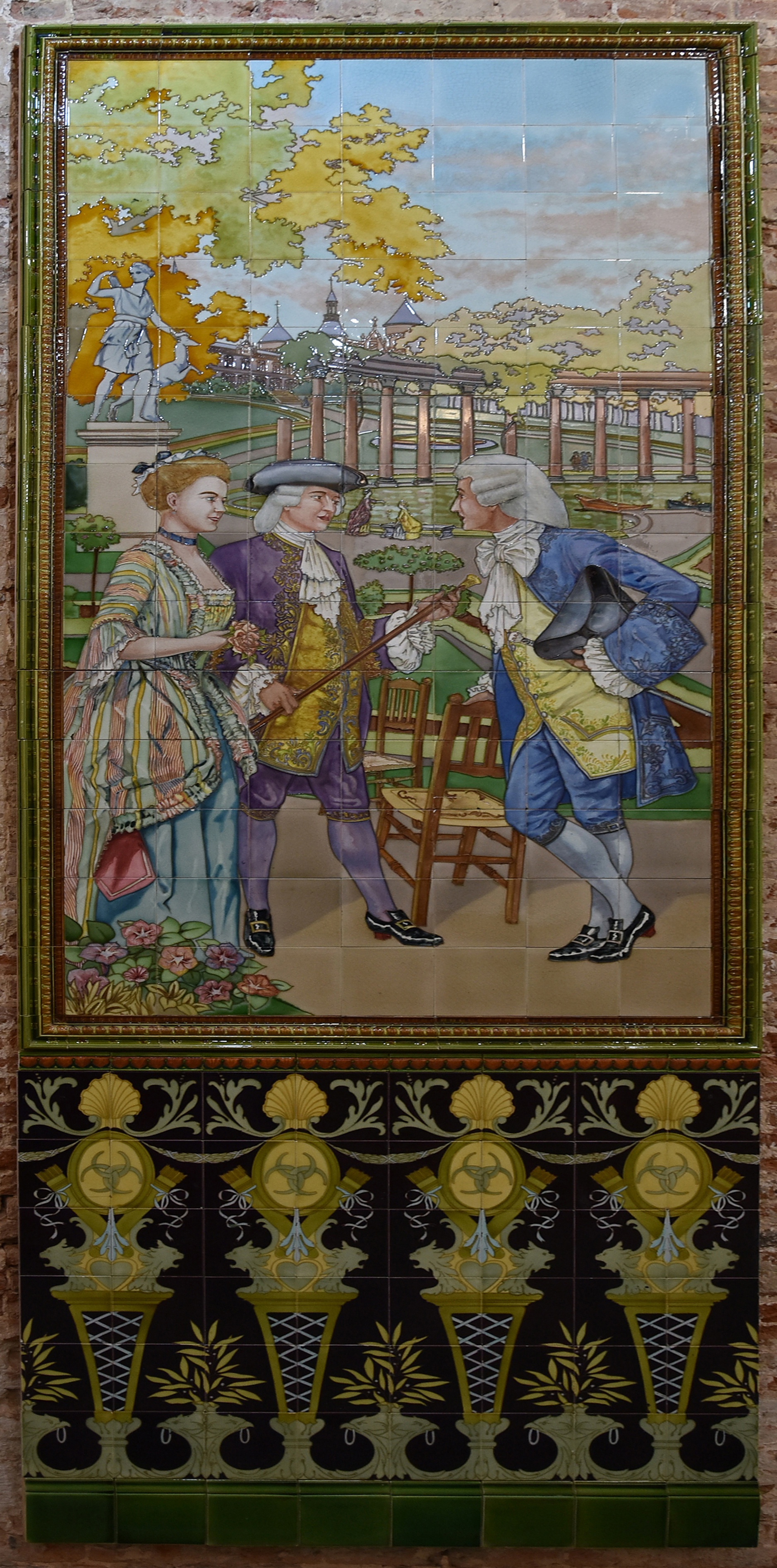 Tegellambirisering 'Het park' Ontwerp H. Bonnerot Gilliot & Roelants tegelmuseum 27-07-2019 This photo of immovable heritage has been taken in the Flemish Region